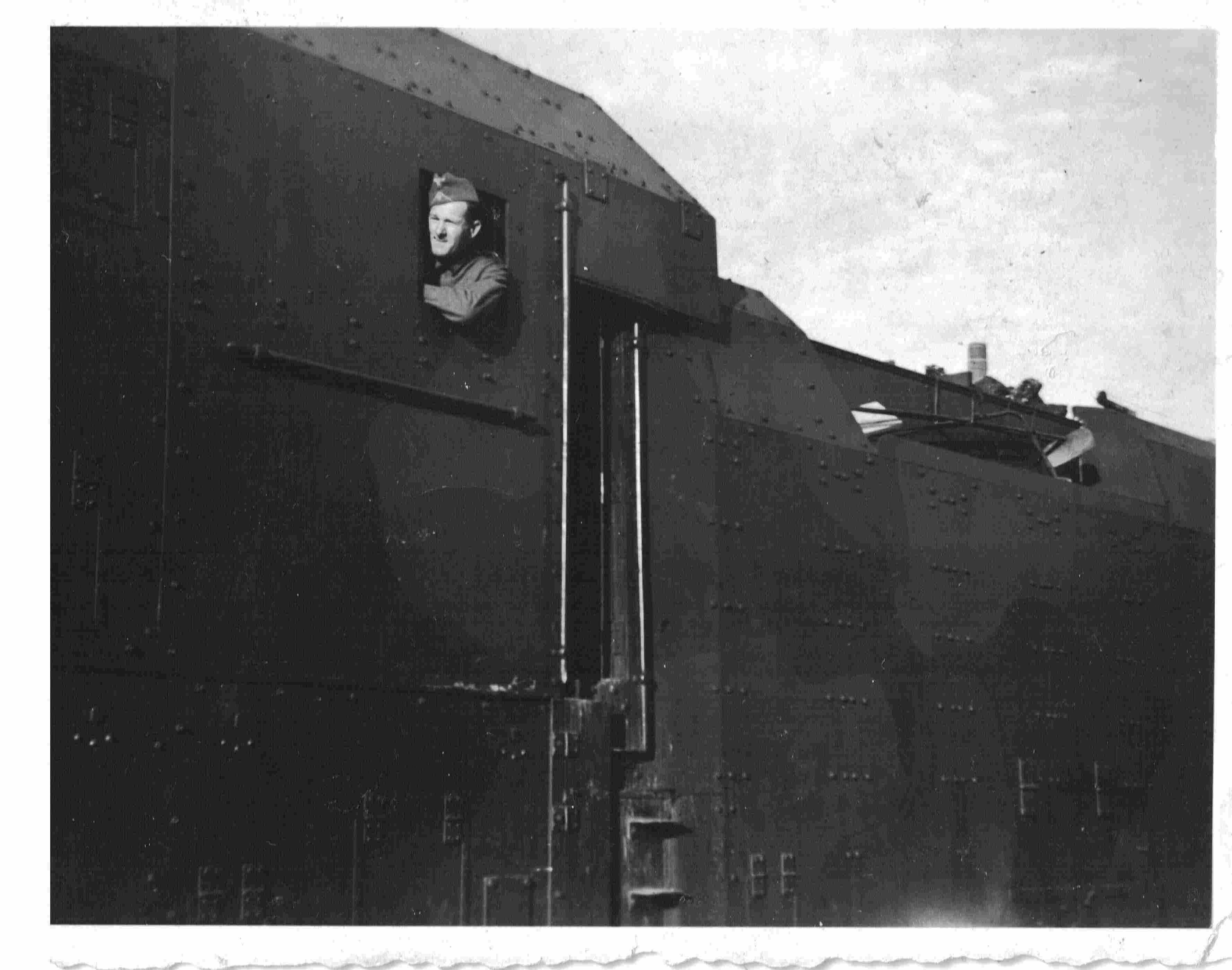 Deutscher Panzerzug im Jahre 1938